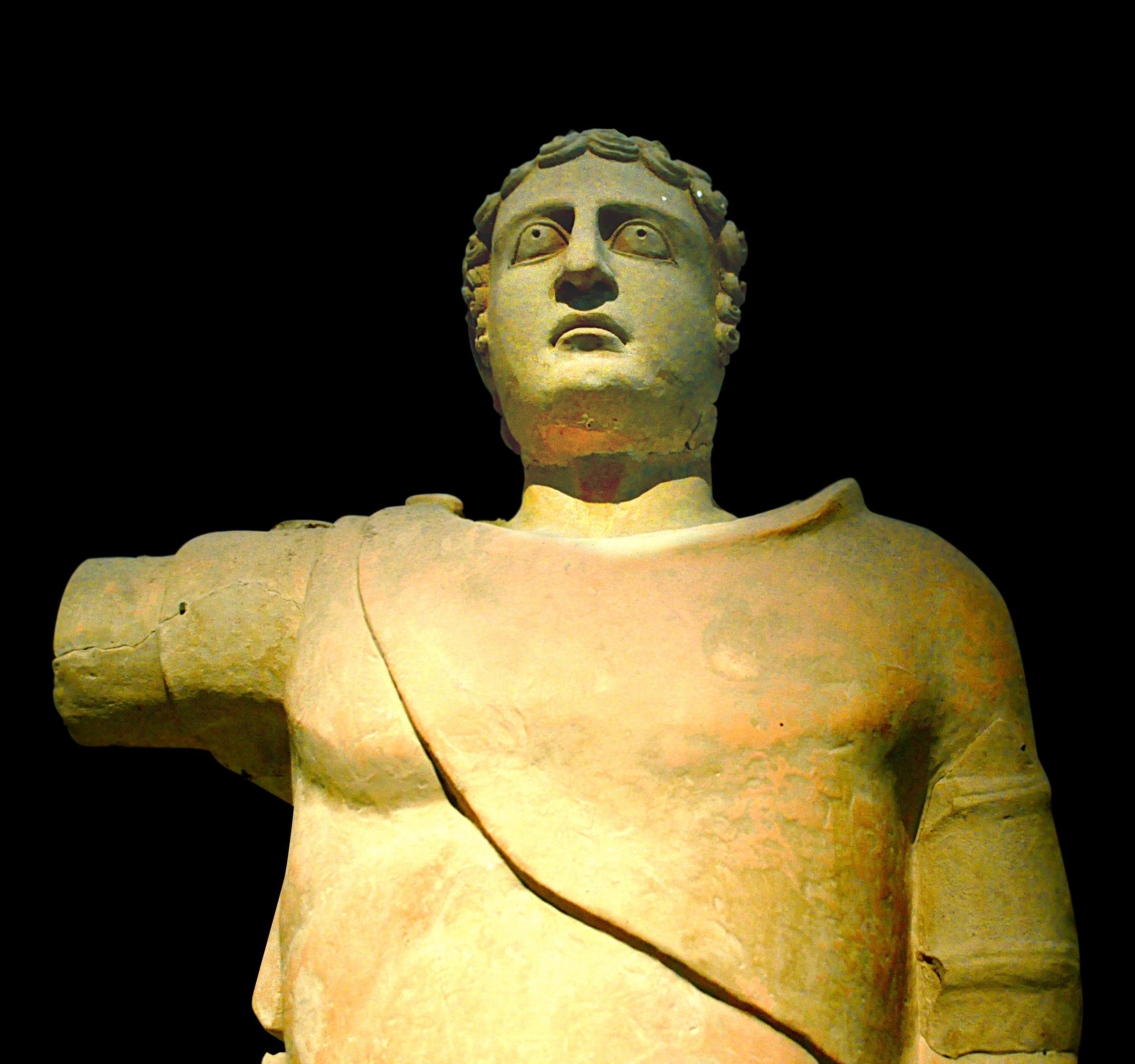 Statue de soldat au Bardo